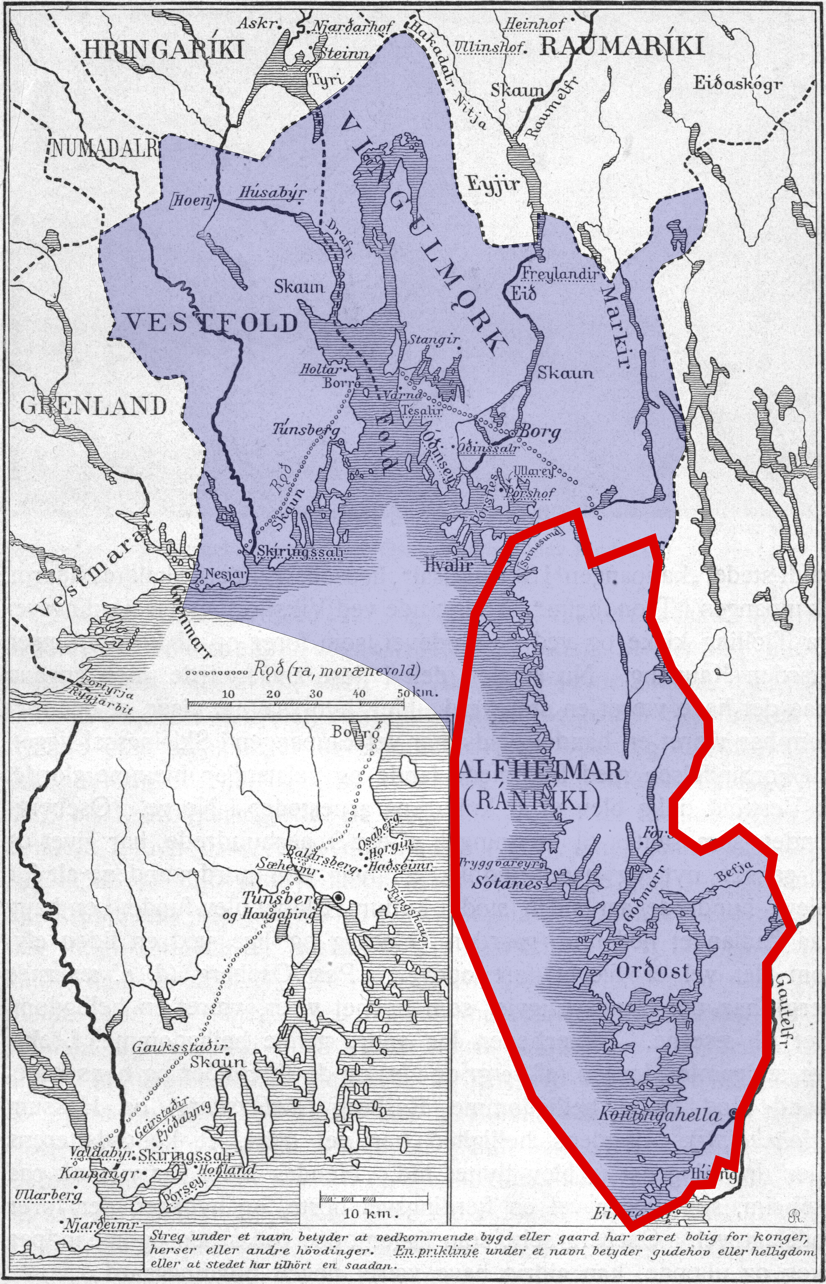 Kart over Viken i middelalderen.